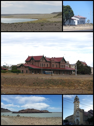 Montaje de Puerto Deseado, Patagonia Argentina